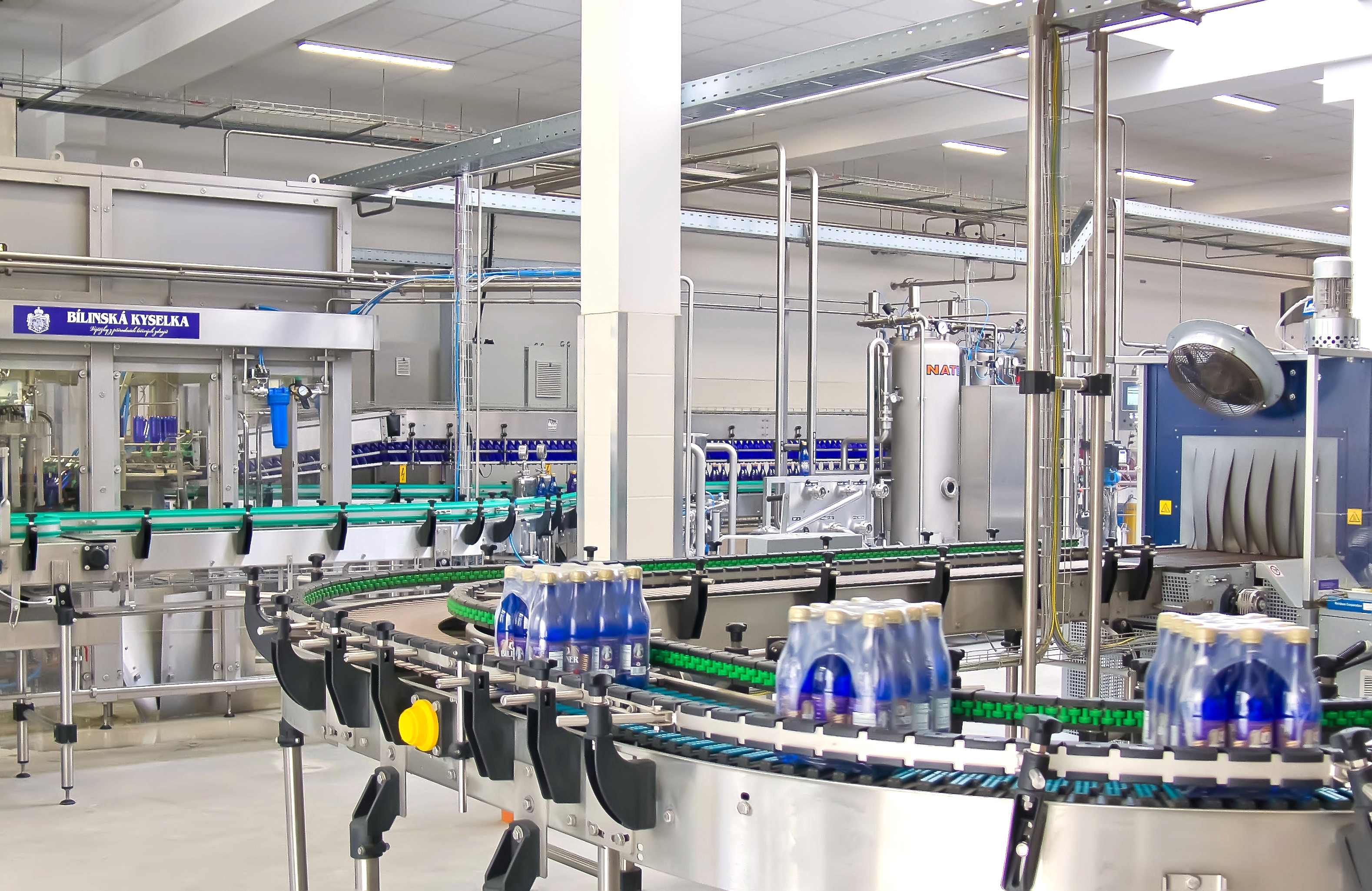 Výrobní závod zřídel v Bílině je po rekonstrukci umístěn v podzemí, aby nerušil budoucí lázeňský rozvoj lokality.